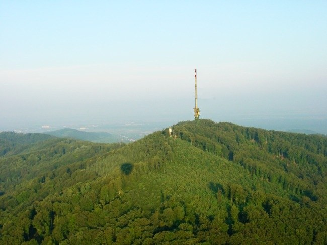 Luftbild vom Totenkopf und Neunlinden (kleiner Turm vor dem Sendemast). Dieses Bild wurde bei einer Ballonfahrt aufgenommen.